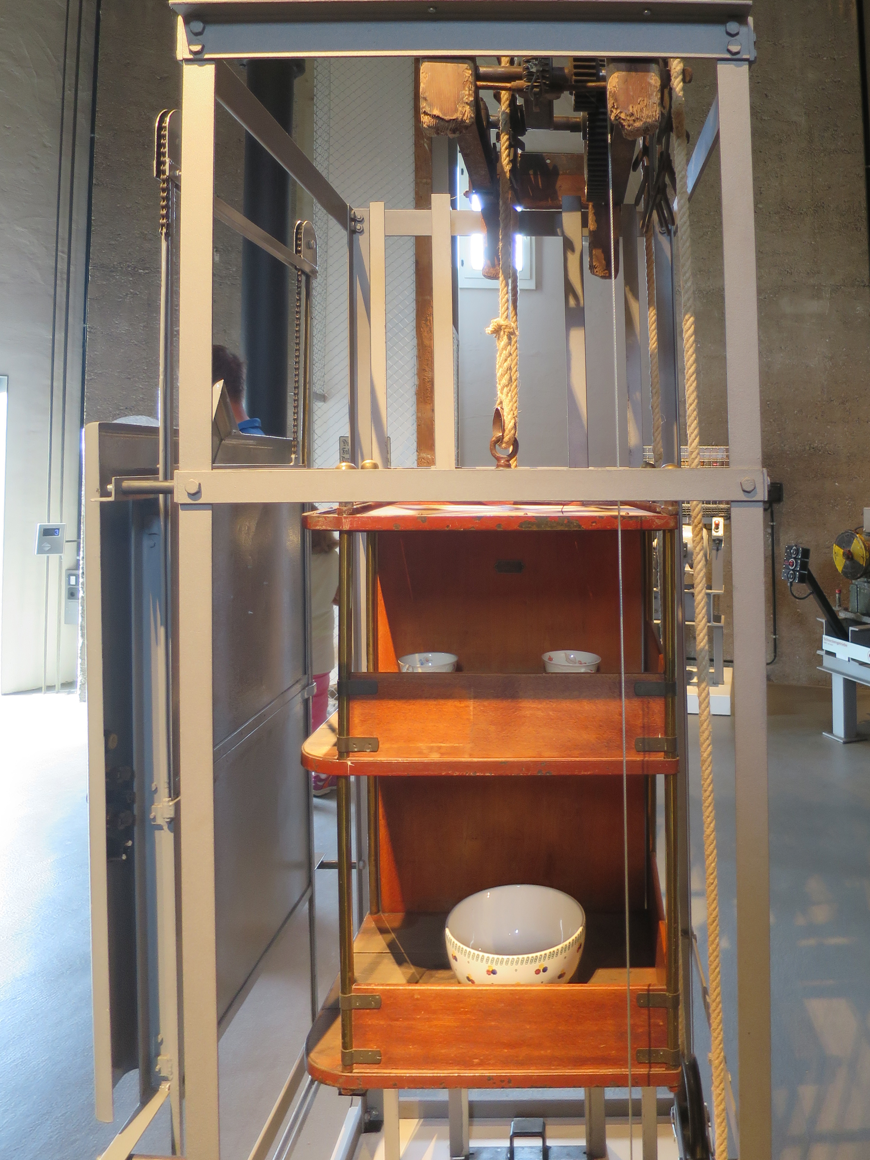 Aufzugmuseum Mannheim-Seckenheim: Speiseaufzug